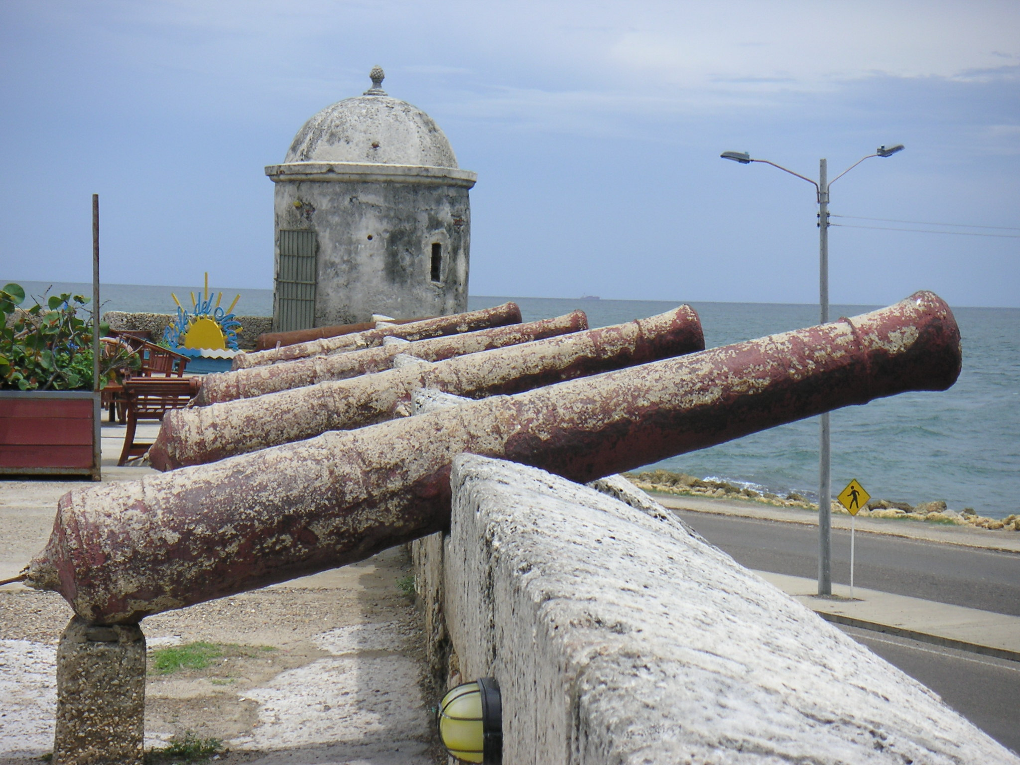 Description: Stadtmauer, Cartagena, Kolumbien Source: Louise Wolff (darina), June 2005